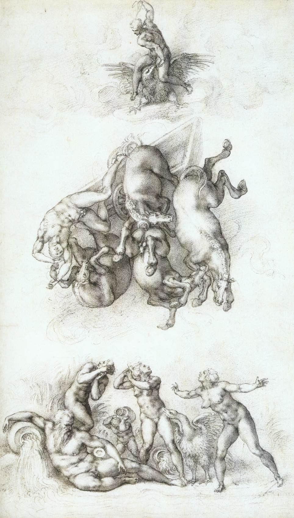 Der Sturz des Phaethon, Schwarze Kreide, 413 x 234 mm, Royal Library, Windsor